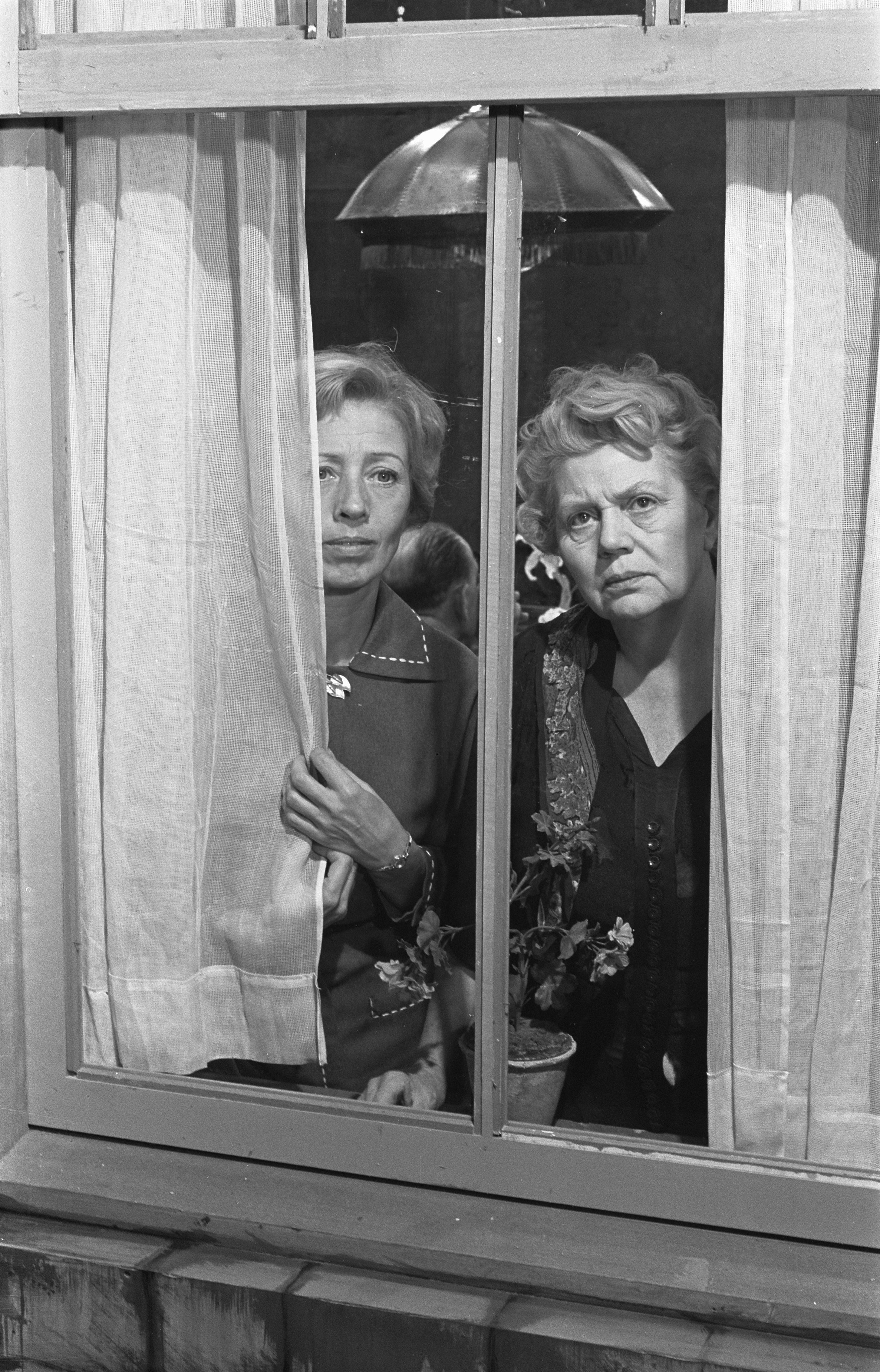 Collectie / Archief : Fotocollectie Anefo Reportage / Serie : [ onbekend ] Beschrijving : Televisiespel "Een bruid in de morgen" van Hugo Claus, Coba Kelling en Enny Meunier Datum : 30 september 1959 Trefwoorden : actrices, televisie, televisiespellen, toneel Persoonsnaam : Kelling, Coba, Meunier, Enny Fotograaf : Pot, Harry / Anefo Auteursrechthebbende : Nationaal Archief Materiaalsoort : Negatief (zwart/wit) Nummer archiefinventaris : bekijk toegang 2.24.01.05 Bestanddeelnummer : 910-7151